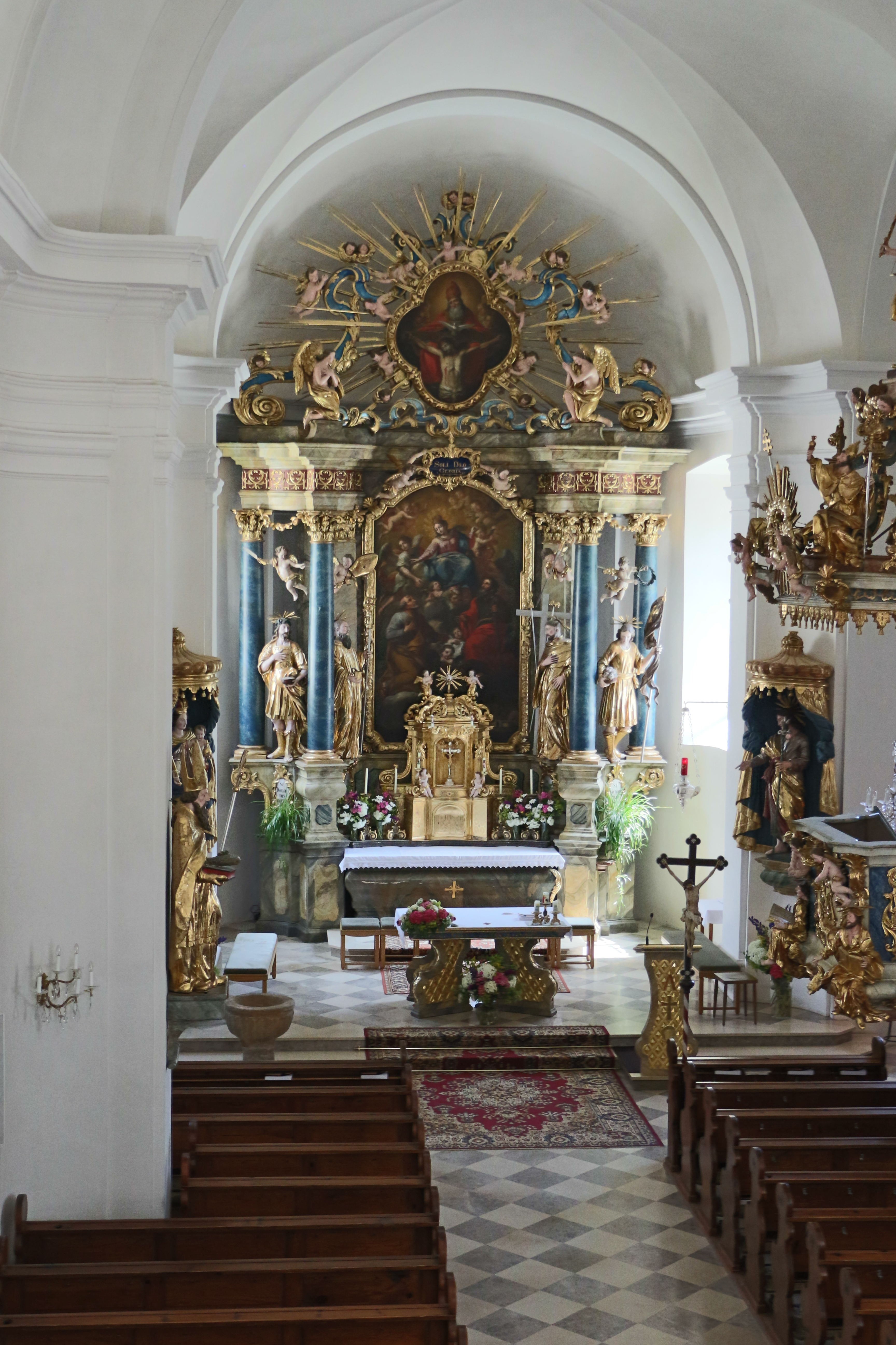 Kath. Pfarrkirche hll. Peter und Paul, Mönichswald, Steiermark